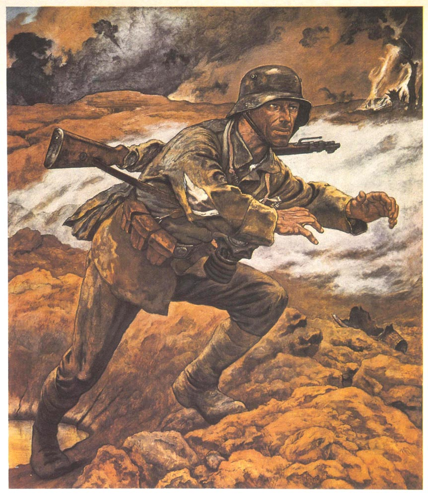 Elk Eber schuf das Bild "Der Meldegänger" im Vorfeld des Zweiten Weltkriegs, sicherlich nicht zufällig mit Bezug auf Hitlers biographische Erfahrung als Meldegänger im Ersten Weltkrieg. Das Bild im Stil des heroischen Realismus hatte eine propagandistische Funktion, und sollte Tugenden wie Kampfbereitschaft, Mut und Heldentum verkörpern.